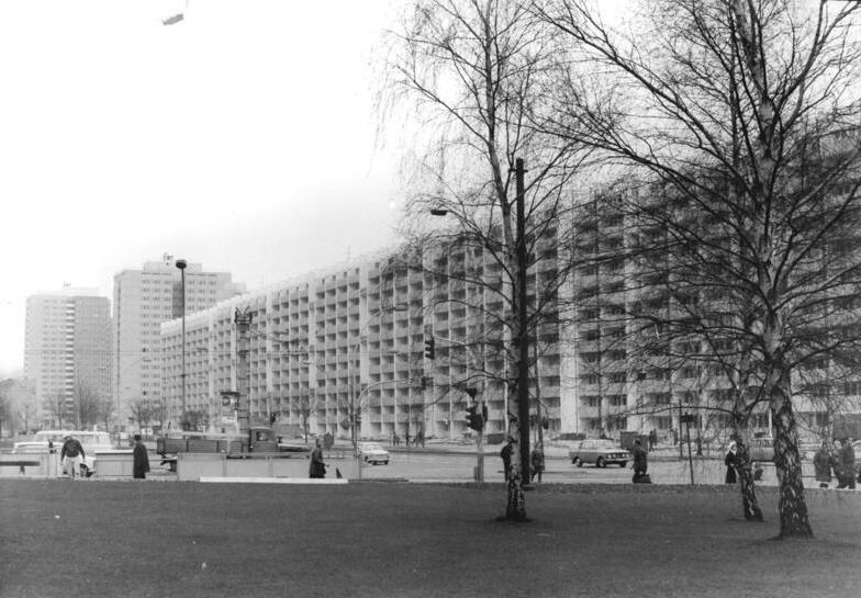 ADN-ZB Sturm 1973 Sue-Schm. Berlin: Längstes Wohnhaus der Hauptstadt kurz vor seiner Fertigstellung. Das 572 Wohnungen umfassende Haus zieht sich von der S-Bahn Frankfurter Allee bis zum U-Bahnhof Magdalenenstraße hin.